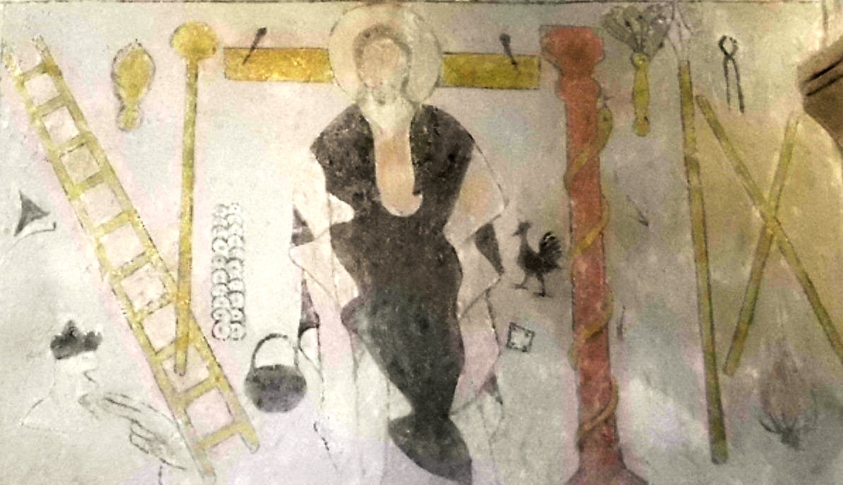 Evang.-Luth. Pfarrkirche St. Michael in Pfofeld im Landkreis Weißenburg-Gunzenhausen, Arma Christi-Fresko